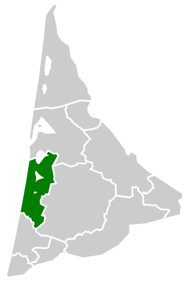 Localisation du Pays de Born